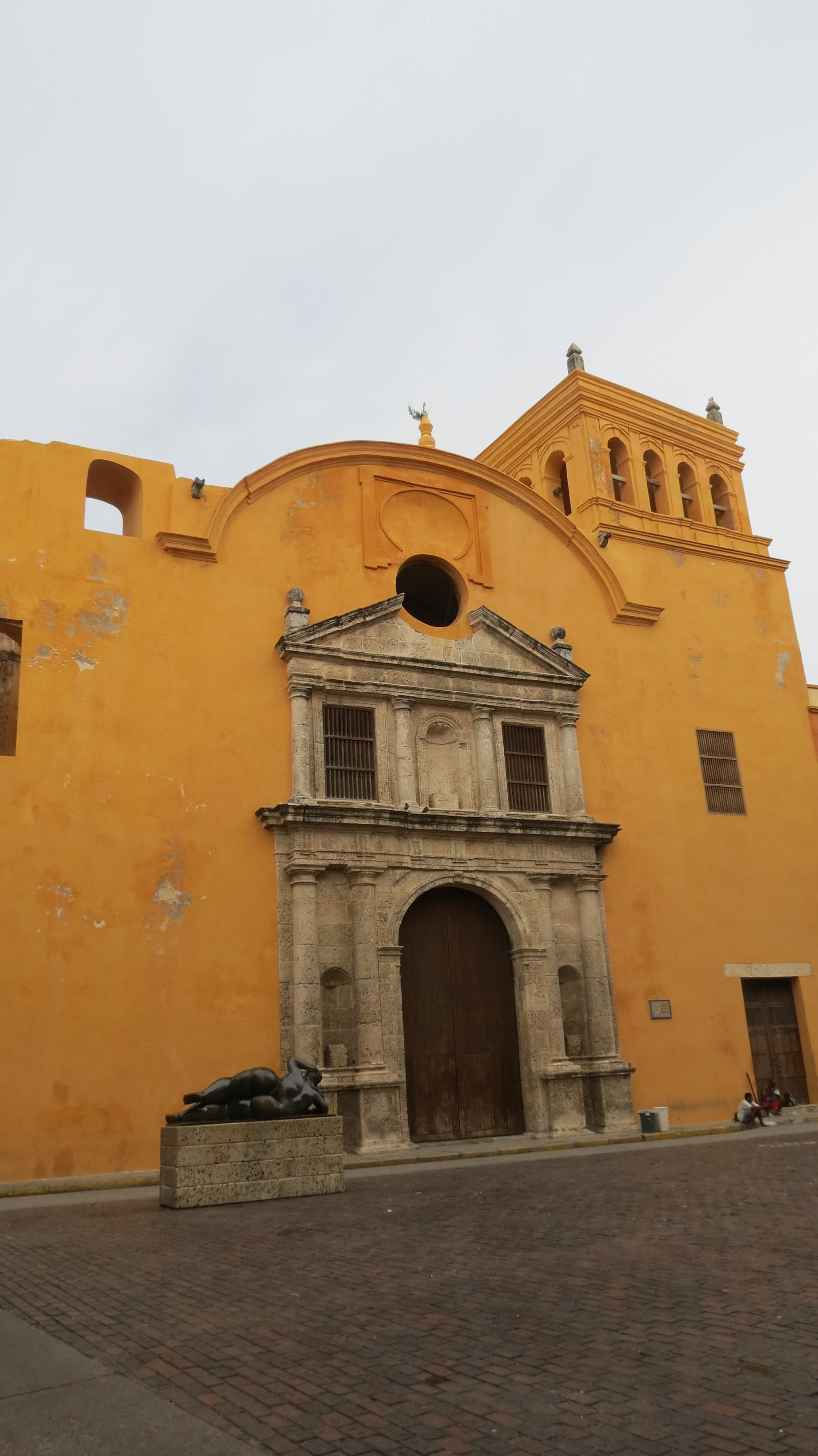 Iglesia y Convento de Santo Domingo